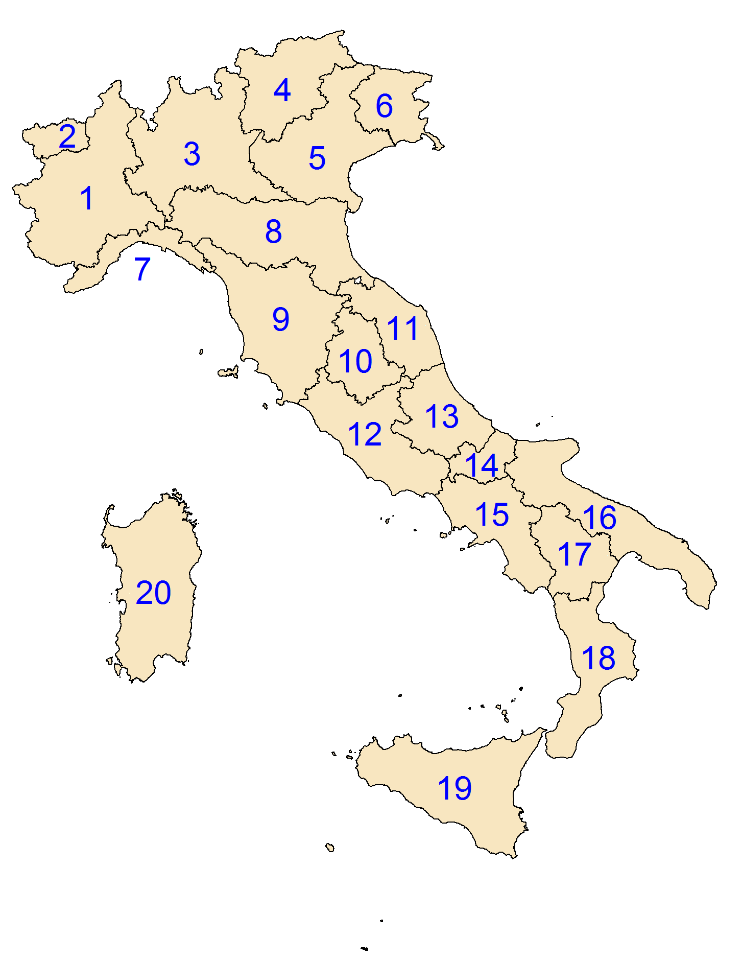 Sono le circoscrizioni elettorali per la prima elezione del Senato della Repubblica, dove il Molise, a norma dell'articolo IV delle disposizioni transitorie e finali della Costituzione, rappresenta una circoscrizione elettorale autonoma.